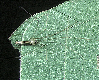 male Leptopholcus tanikawai from Okinawa.